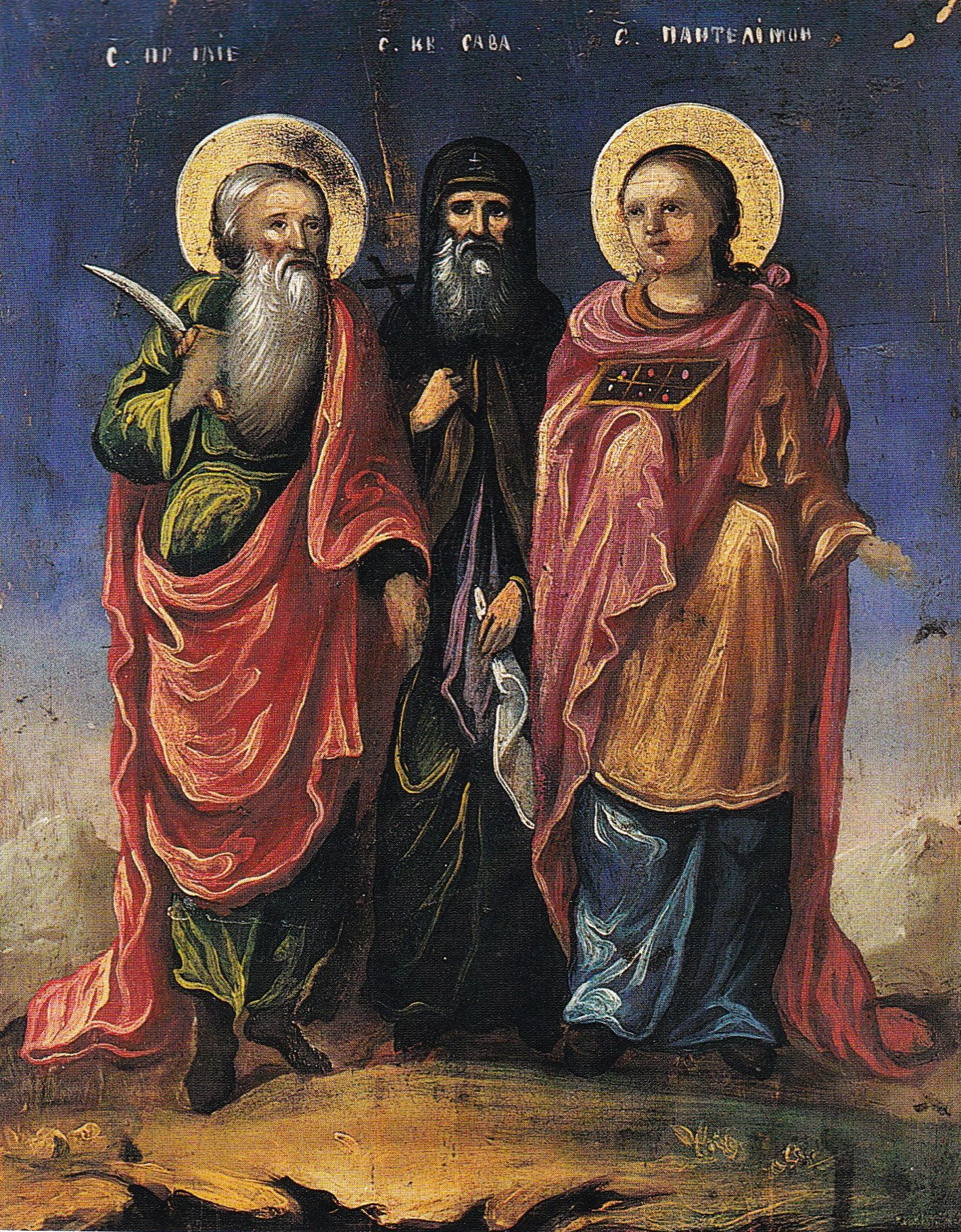 Nicolae Grigorescu - Icoana Sfinții Ilie, Sava și Pantelimon din biserica de la Băicoi